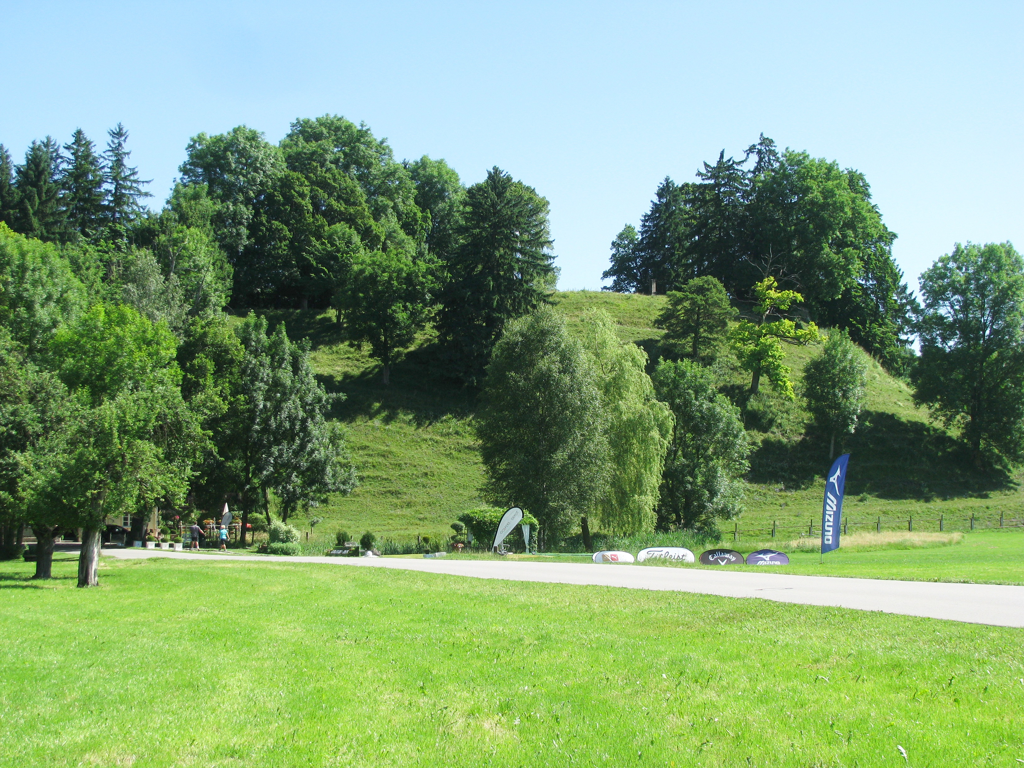 Burgstall Rauenlechsberg, Burghügel aus südwestlicher Richtung